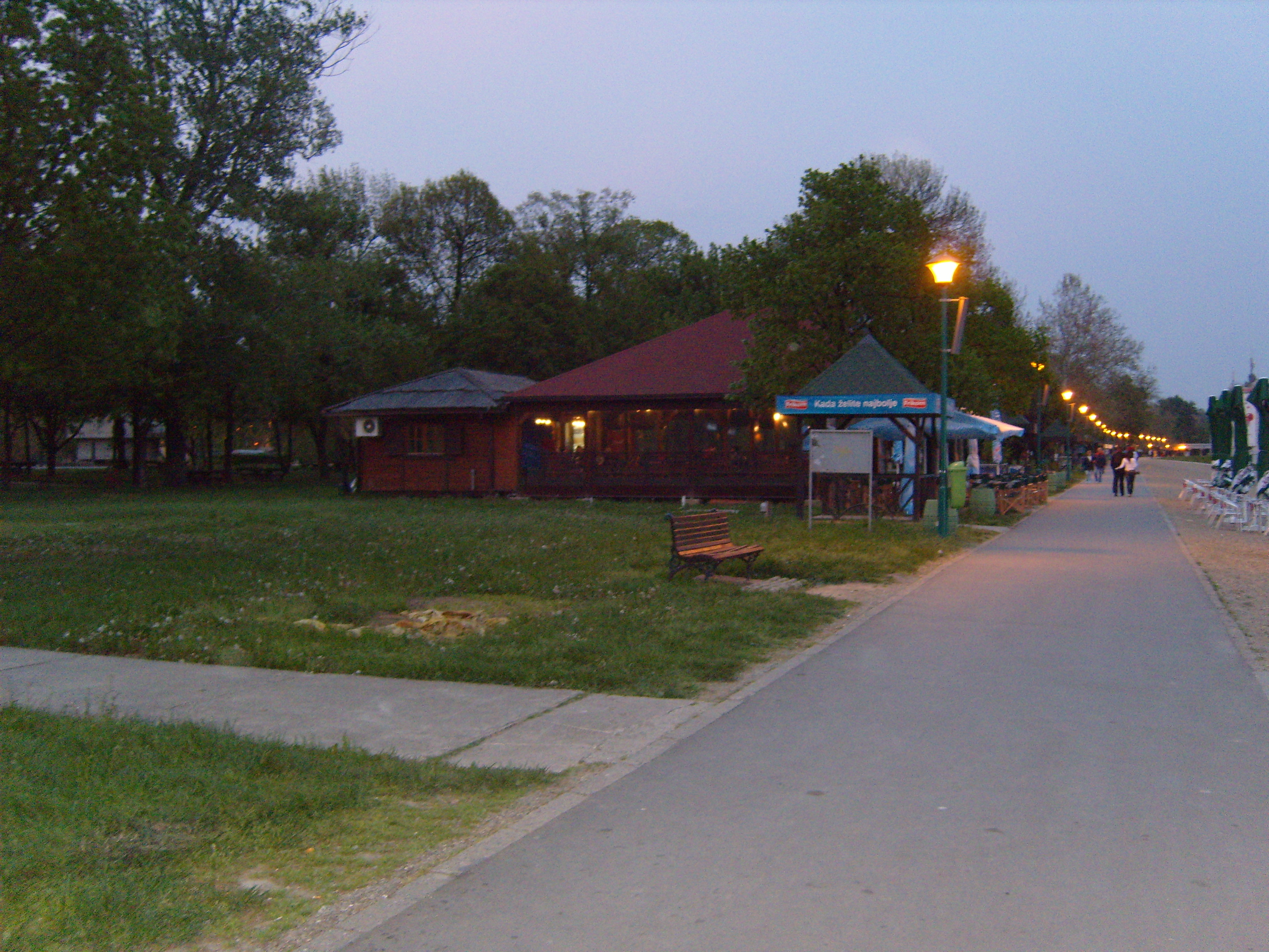 Ada Ciganlija promenade at dusk 2 (2008-04-14)